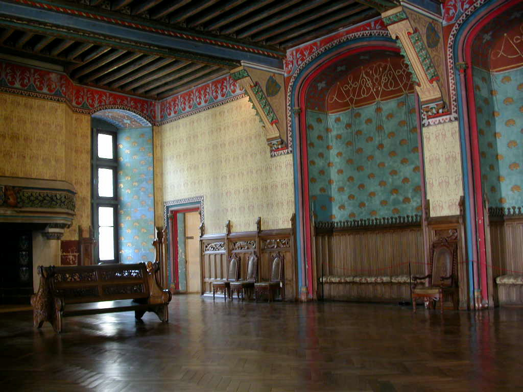 Chateau de Pierrefonds , Oise, France